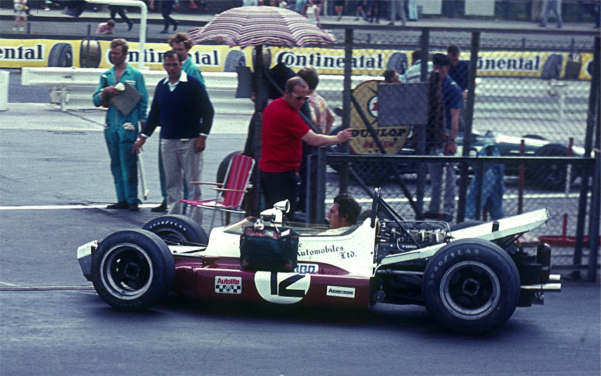 Bildbeschreibung: Vic Elford beim Training zum GP von Deutschland 1969 Fotograf: Lothar Spurzem Datum: 01.08.1969 an den Boxen des Nürburgrings (Einfahrt von der Gegengeraden)